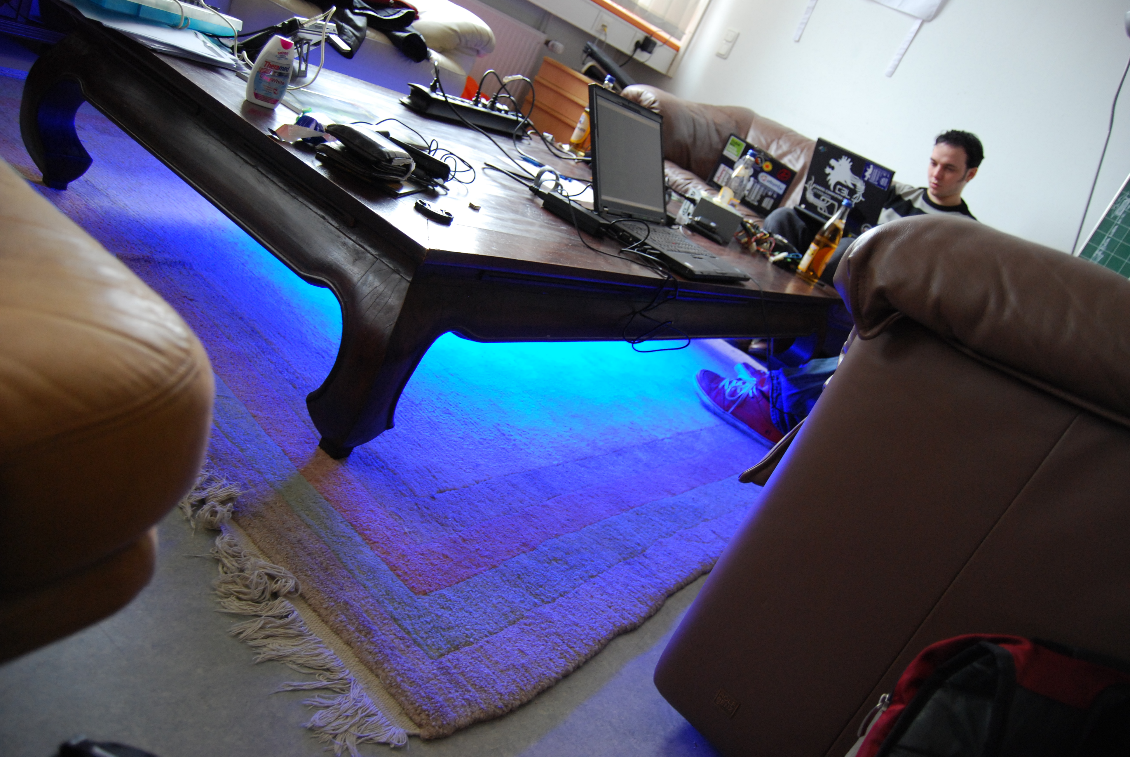 Den Chill Raum am syn2cat Hackerspace zu Stroossen